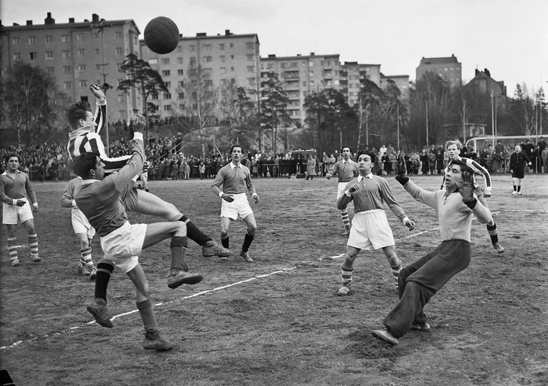 Stadshagens Idrottsplats. Fotbollsmatch mellan Kungsholmsbor och romer.